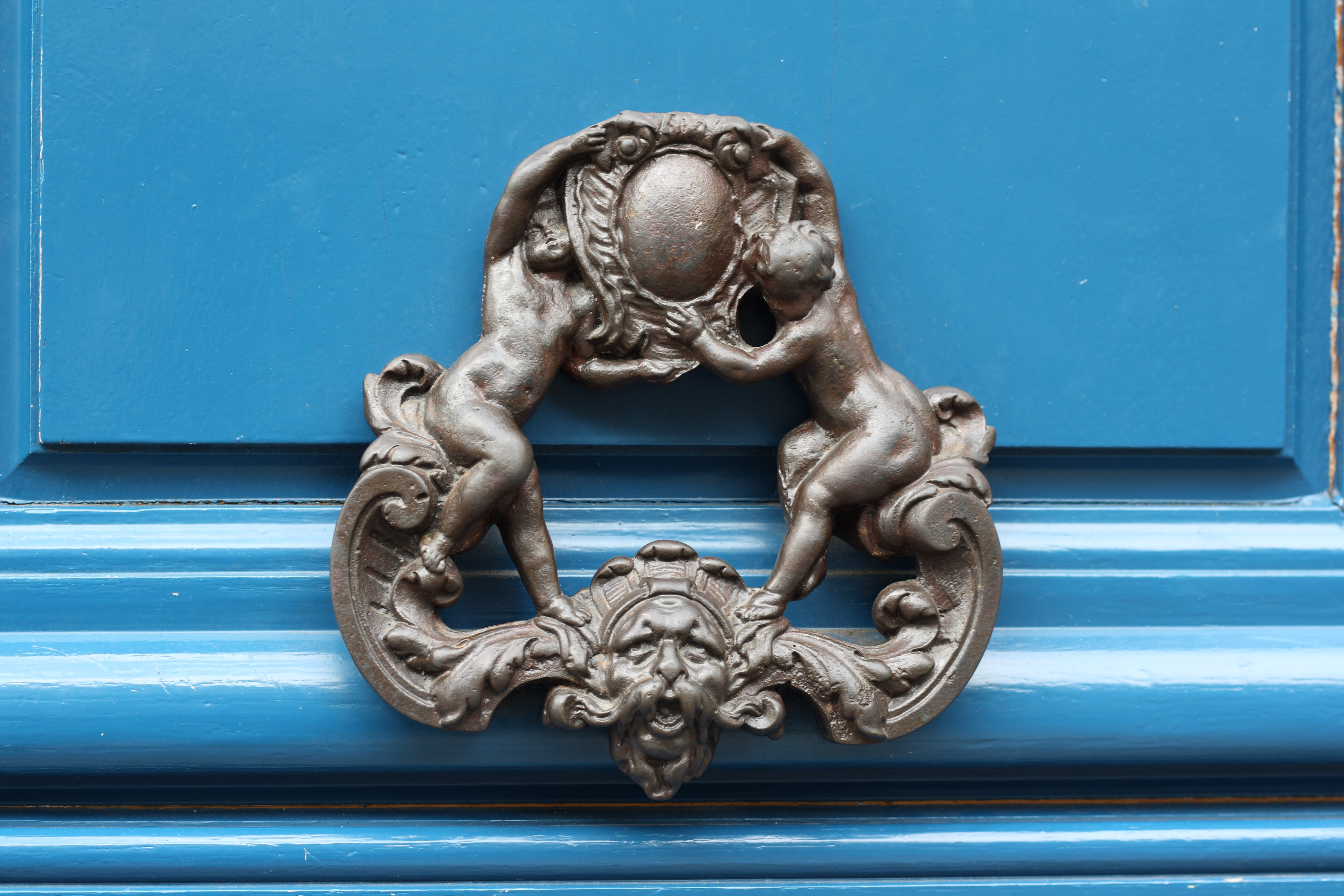 Türklopfer am Haus 22, rue de Douai in Paris (9. Arrondissement)